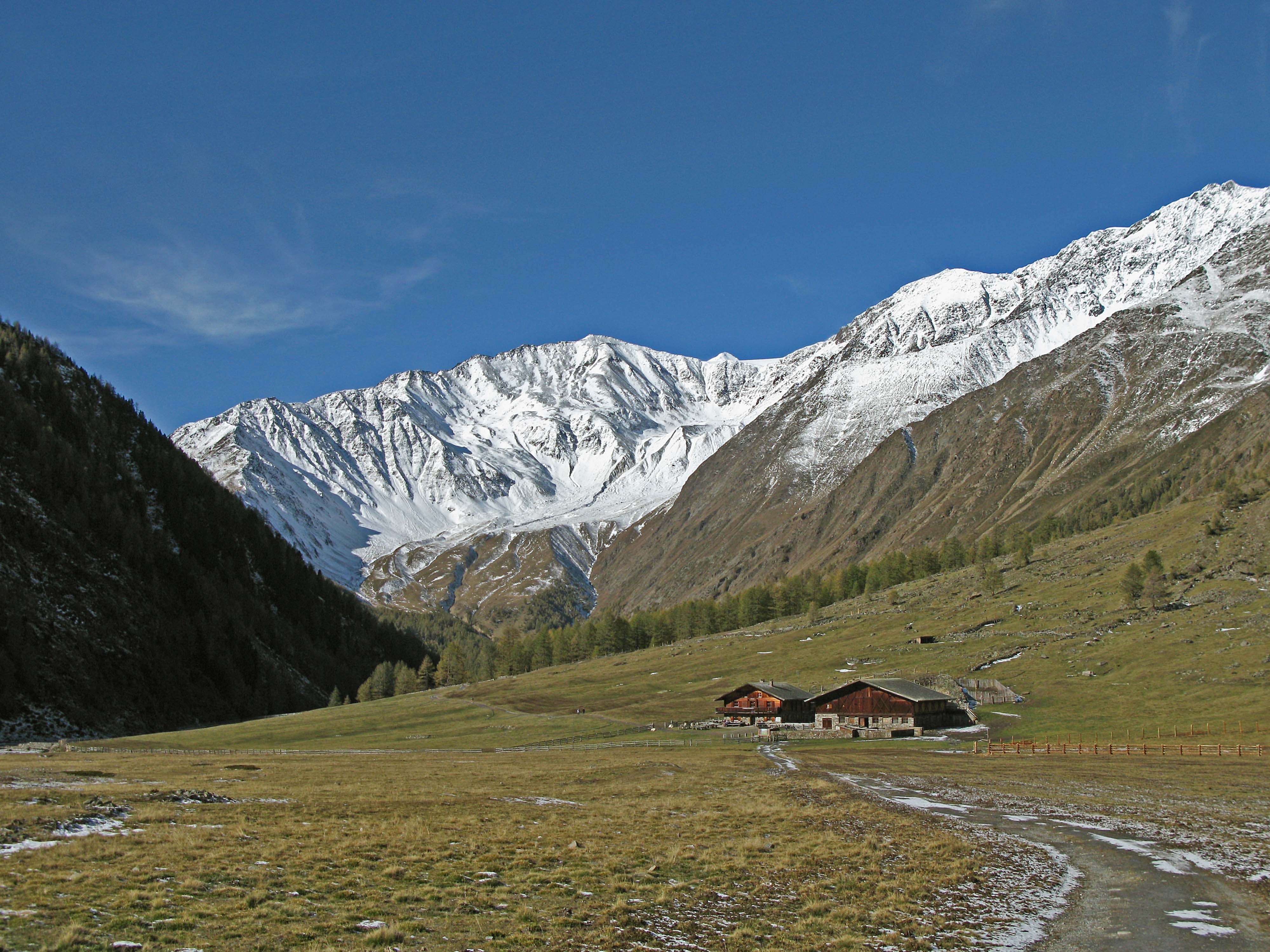 Der Eishof im Pfossental. Der Blick geht nach Westen zur Faulwand (Croda Marcia, 3416 m). Rechts davon die Mittlere Marzell Spitze, ganz rechts die Hintere Schwärze (Cima Nera, 3624 m). Zwischen Faulwand und Mittlerer Marzell Spitze lugt der Gipfel des Similaun (3599 m) über den Bergkamm.